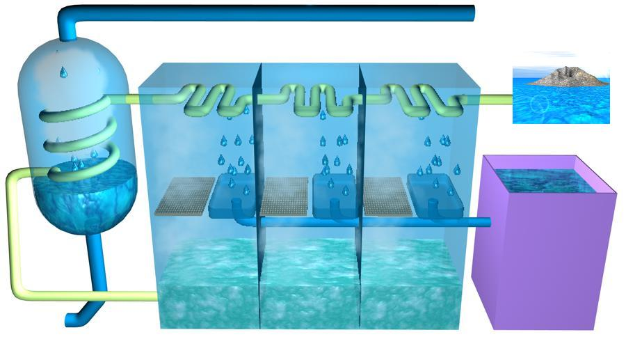 Premena morskej vody na pitnu